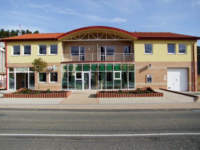 Polyfunkčný objekt Široké